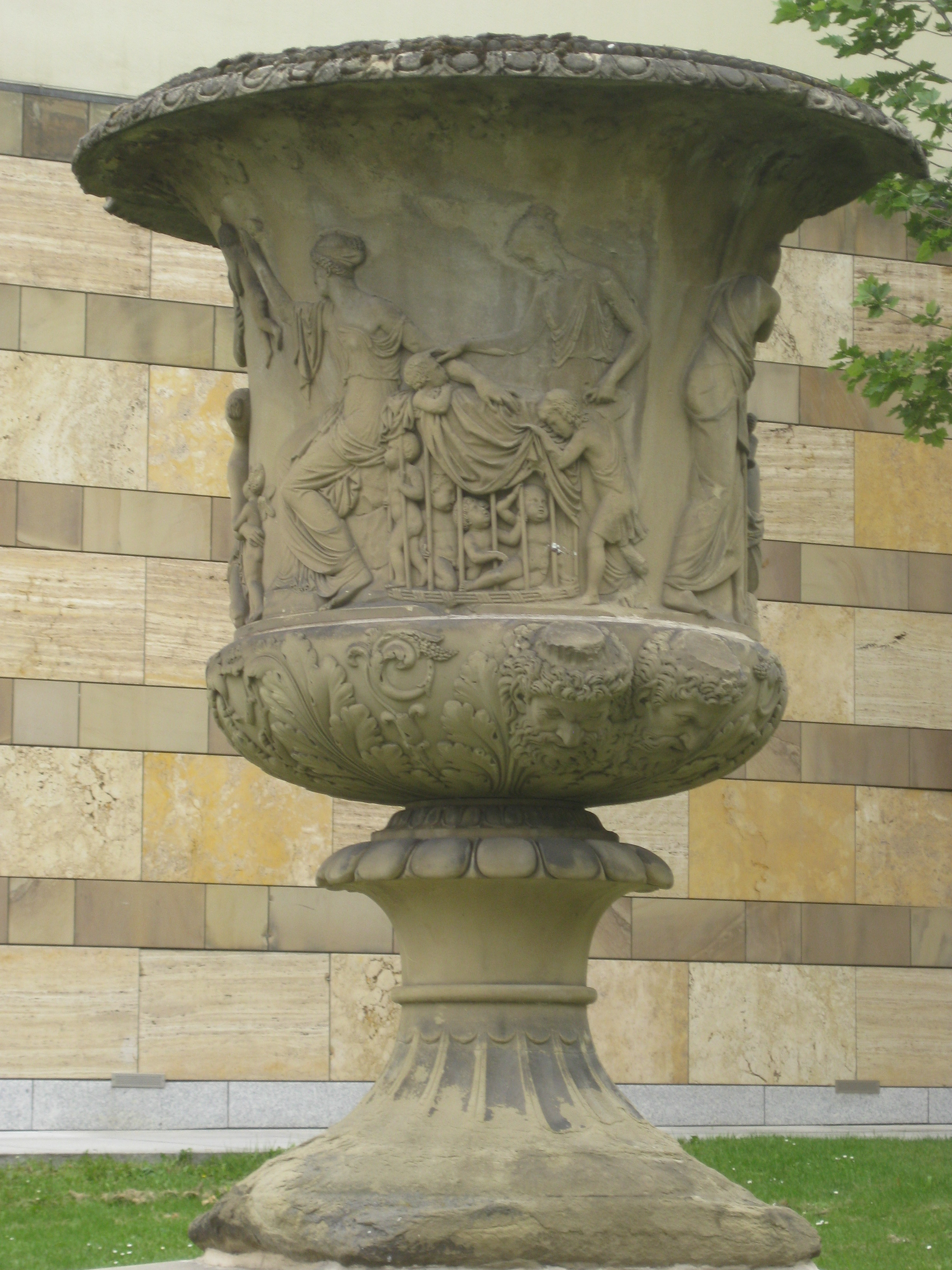 Liebesvase von Friedrich Distelbarth (um 1831), Sandstein, Monumentalvase mit Allegorie der Liebesalter nach dem Relief „Kærlighedens Aldre“ (Der Liebe Alter) von Bertel Thorvaldsen, Stuttgart, Vorplatz am Kammertheater bei der Neuen Staatsgalerie